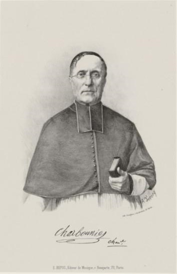 Chanoine Etienne-Paul Charbonnier par Adrien Lecocq ; Lithographie, 16 x 11,5 cm Édité par E. Repos, Paris, 1870 Bibliothèque nationale de France, département Musique Ensemble documentaire : IconMUS1